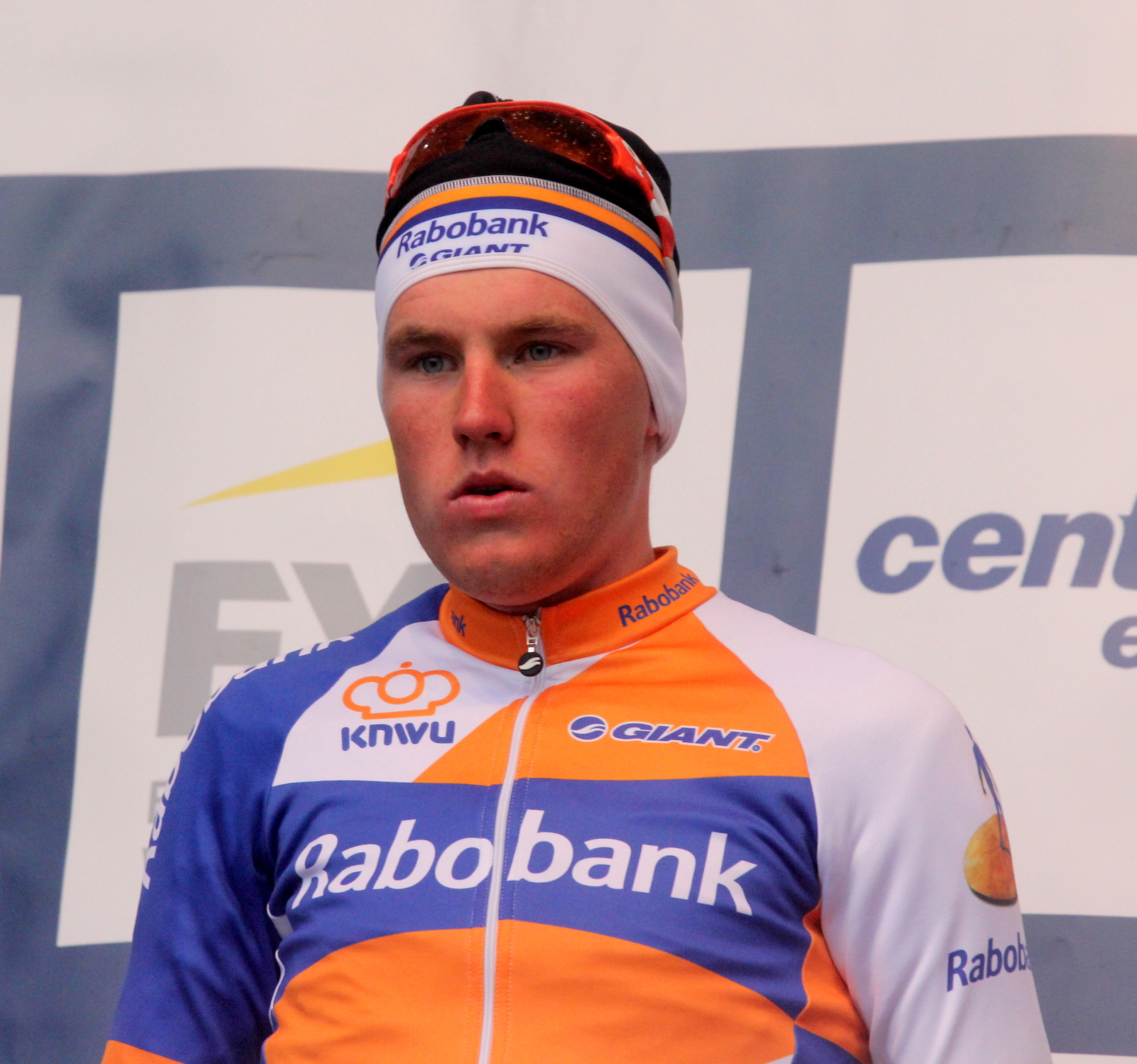 Mike Teunissen under Tour des Fjords